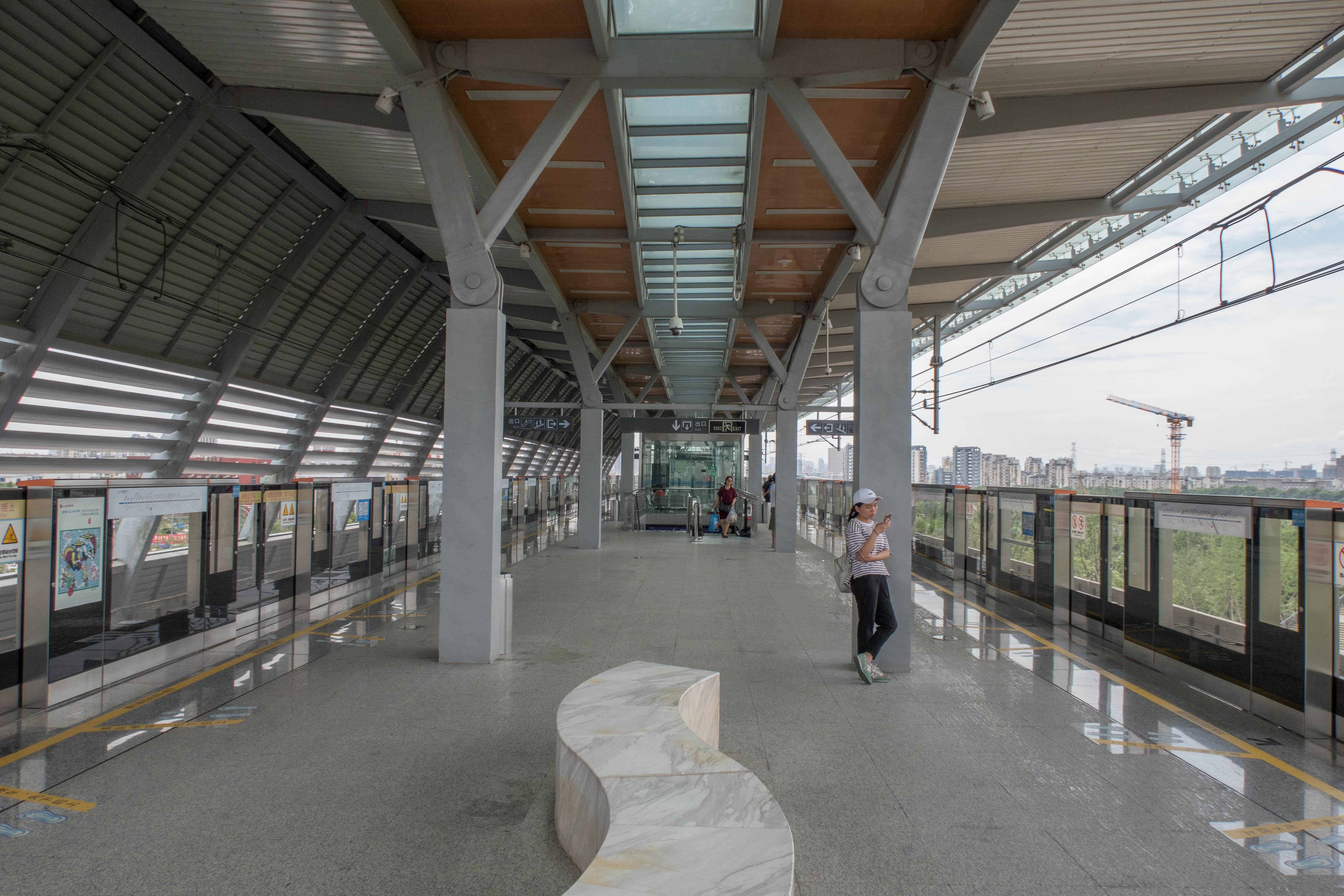 宁波地铁芦港站